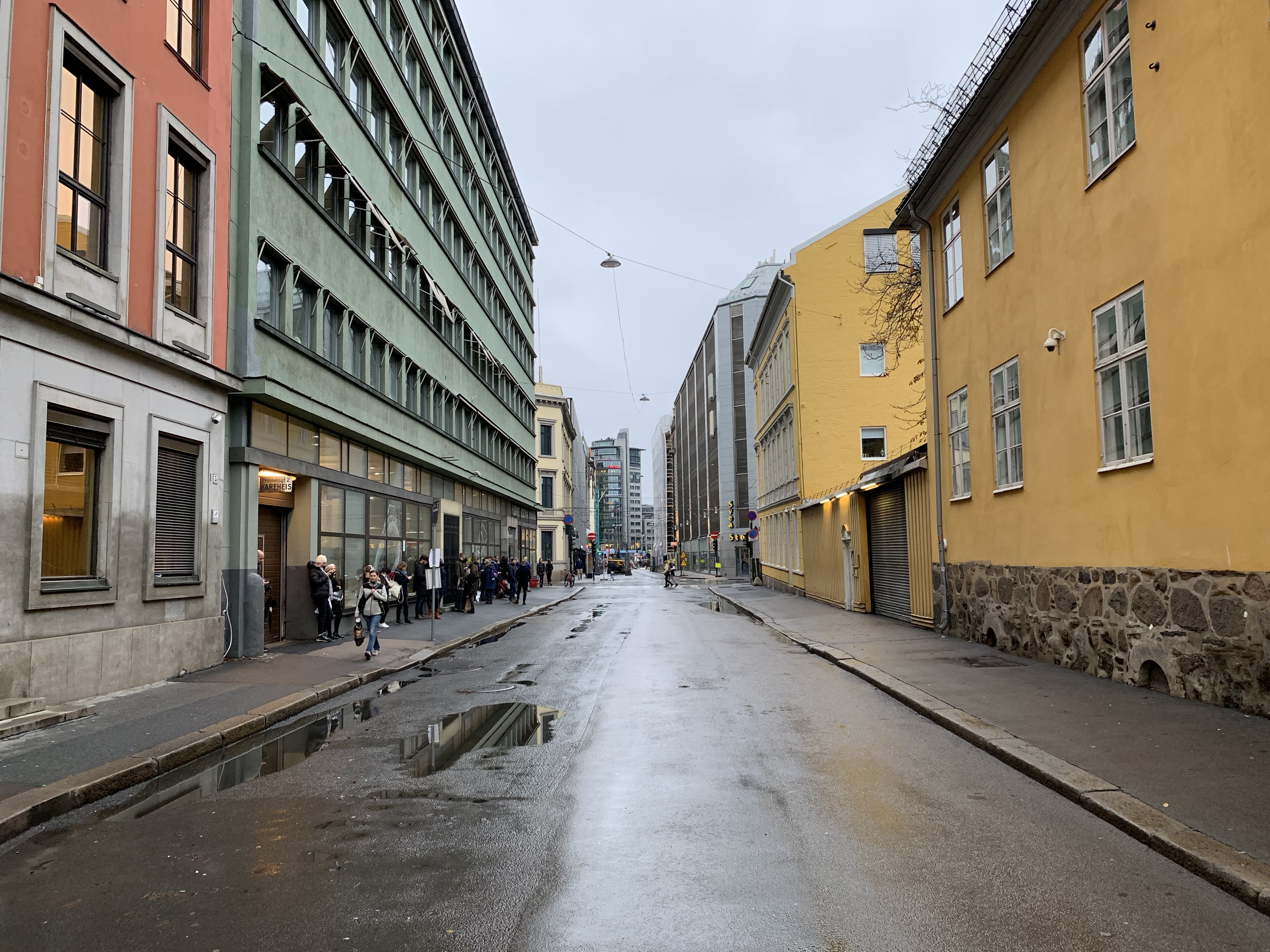 Fred. Olsens gate i Oslo, sett mot Jernbanetorget fra krysset mot Prinsens gate.